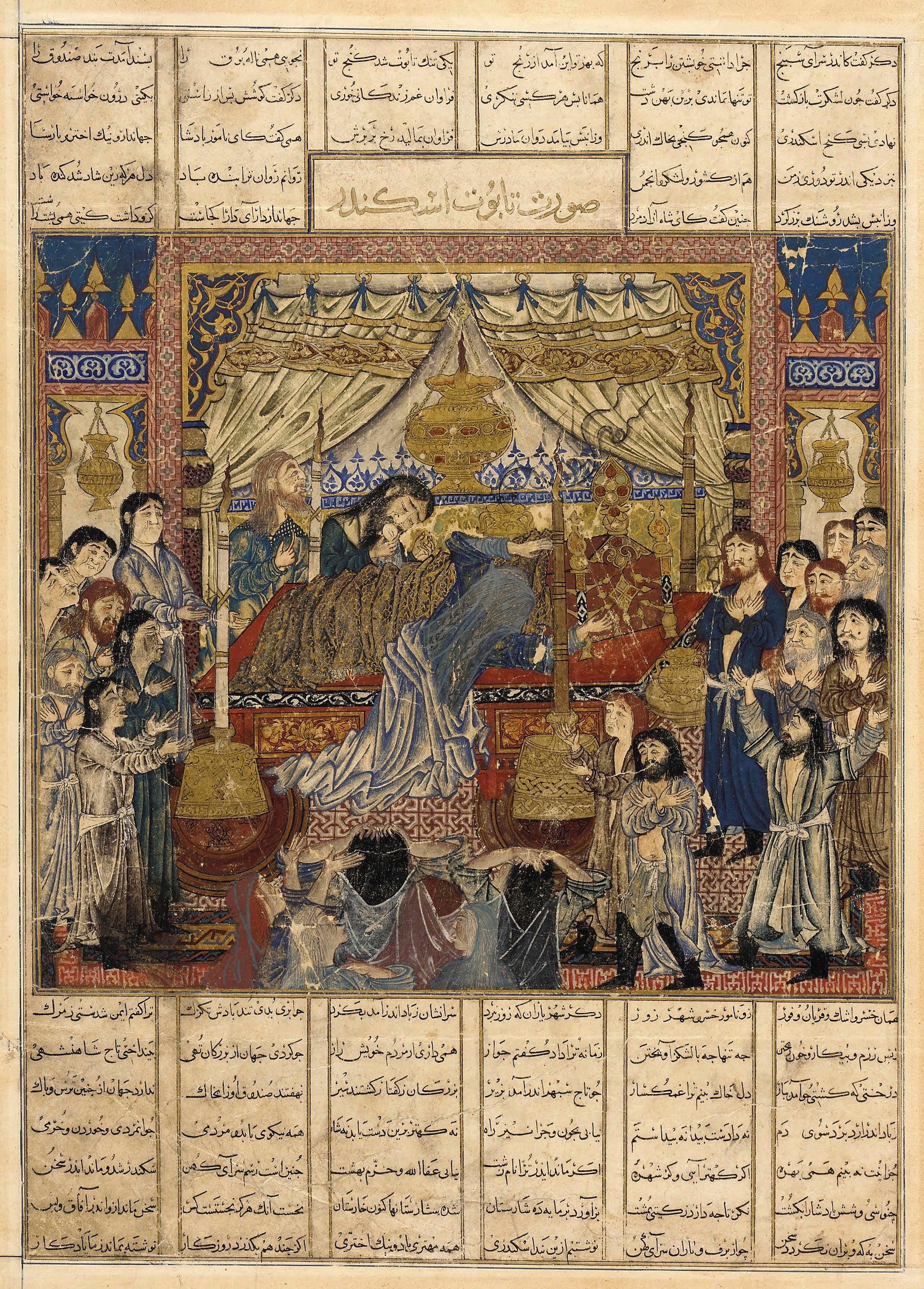 Demotte_Shahname_Оплакивание_Искандера1328-36_Фрир